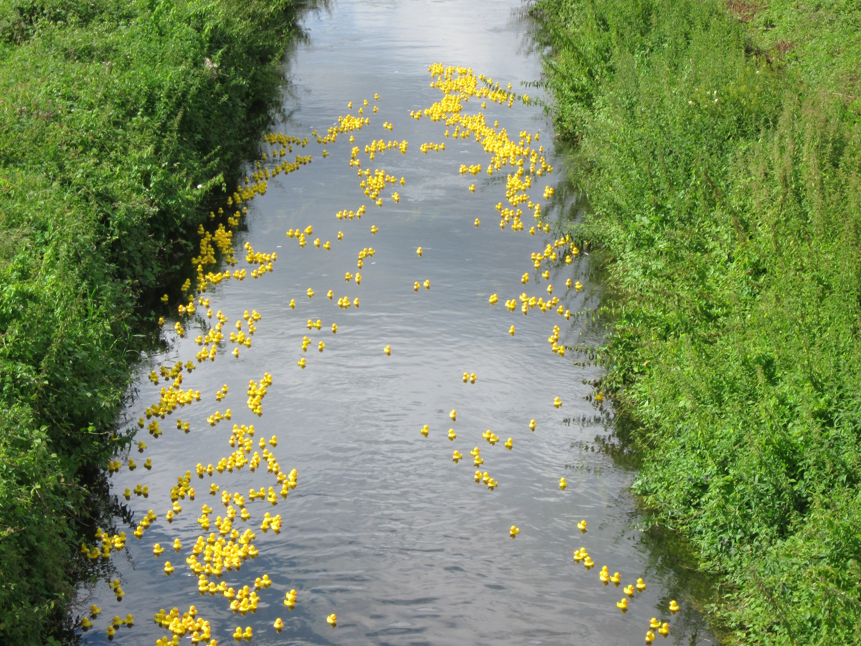 Entenrennen auf dem Kraichbach in Ketsch